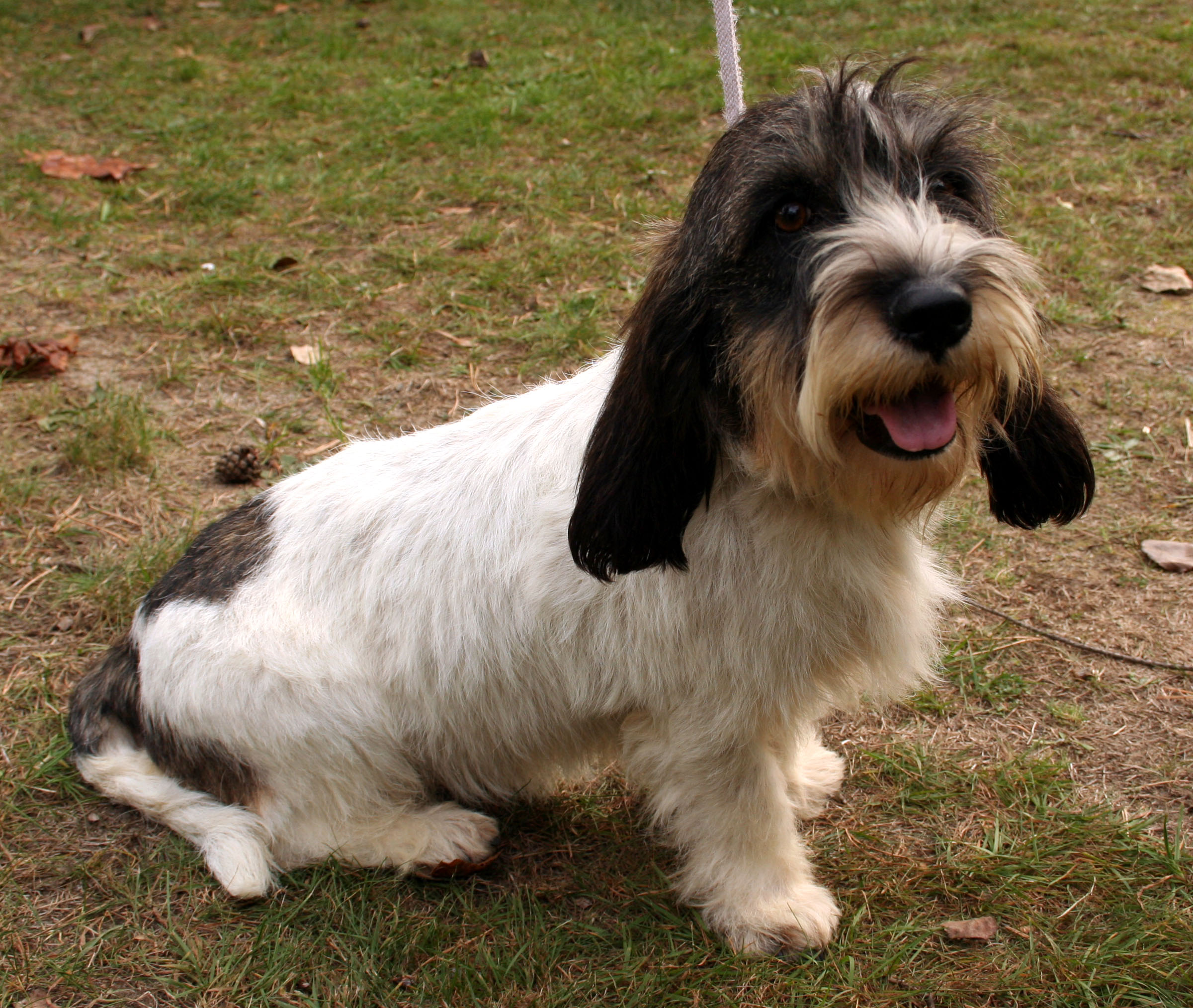 Petit_basset_grifon_vendeen na krajowej wystawie w Rybniku - Kamieniu